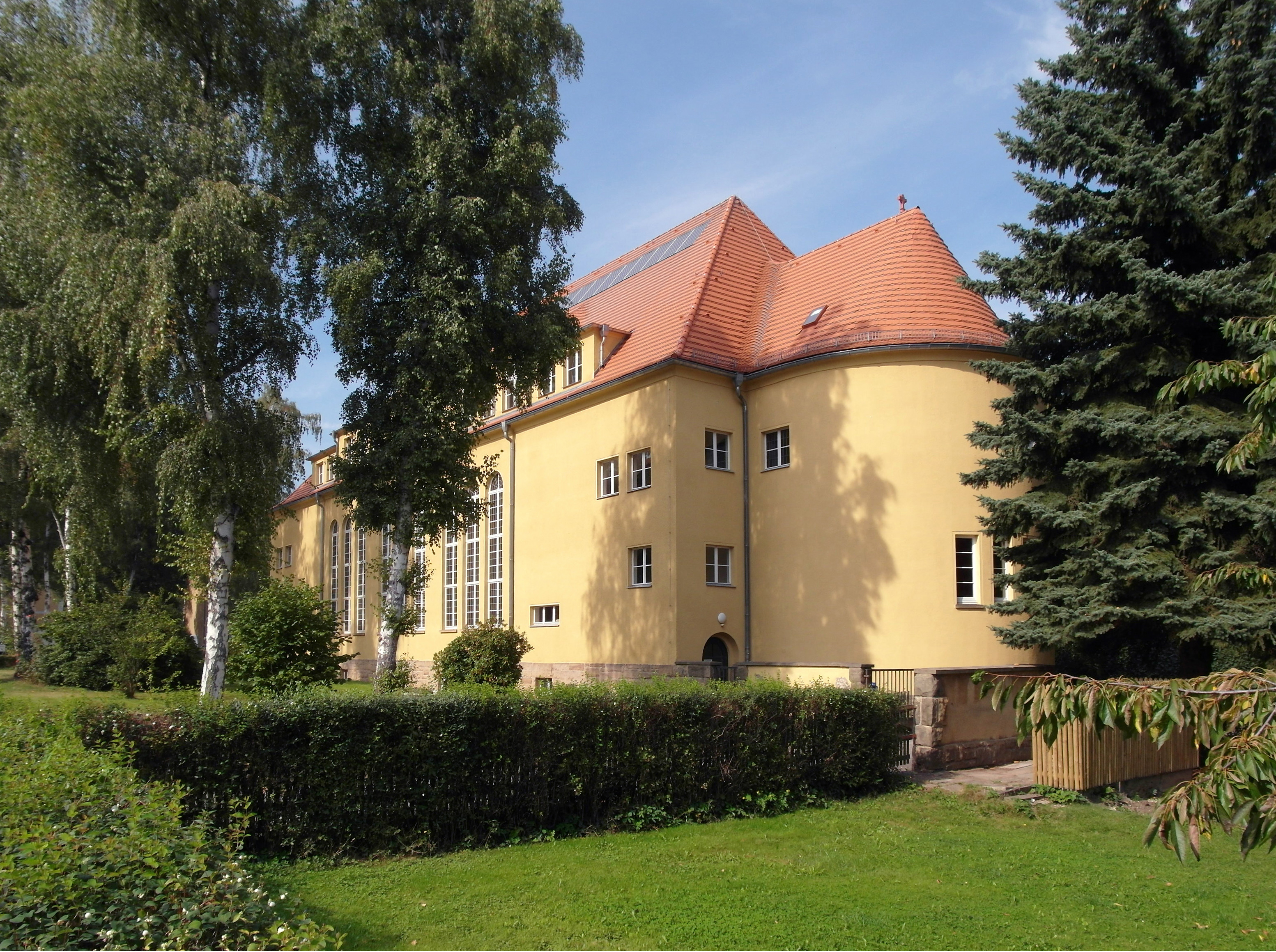 25.09.2016 01159 Dresden-Löbtau: Evangelische Hoffnungskirche, Clara-Zetkin-Str. 30 (GMP: 51.038042,13.694407). Die Hoffnungskirche (1935-36) vom Architekten Kolbe sollte eigentlich nur das Gemeindehaus werden. Die richtige Kirche wollte man nebenan bauen. Die Pläne für die mächtige, 1200 Personen fassende Kirche hatte Kolbe schon fertig. 1938 wollte man bauen. Inzwischen war Kolbe gestorben und aus Geldmangel kam es nicht dazu. 1937 wurden für den freistehenden Glockenturm im Garten drei Bronzeglocken gegossen, die 1941 für Kriegszwecke eingeschmolzen wurden. [SAM7816.JPG]20160925100DR(c)Blobelt